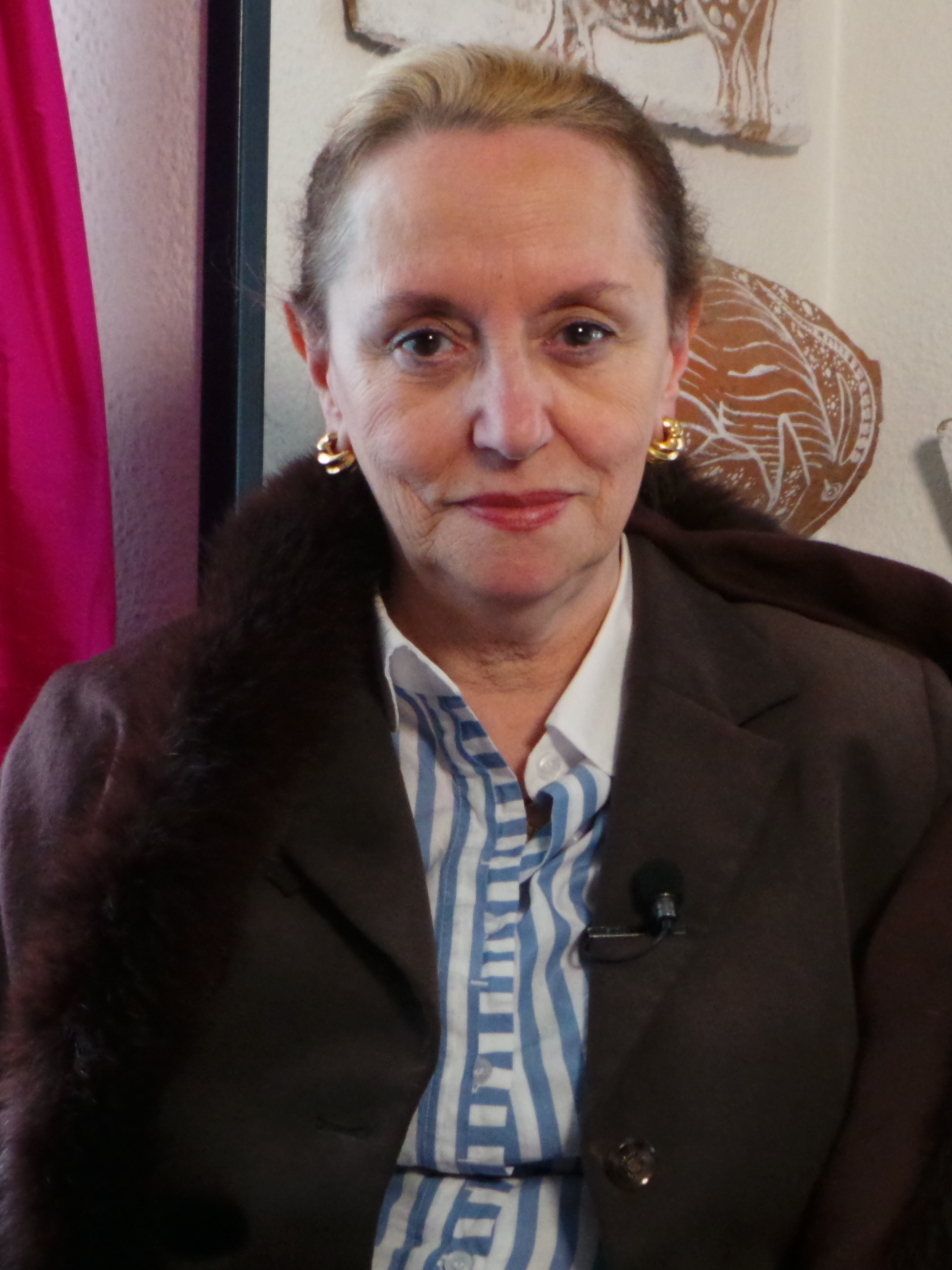 Filósofa Española Una fotografía de Montserrat Boix Madrid